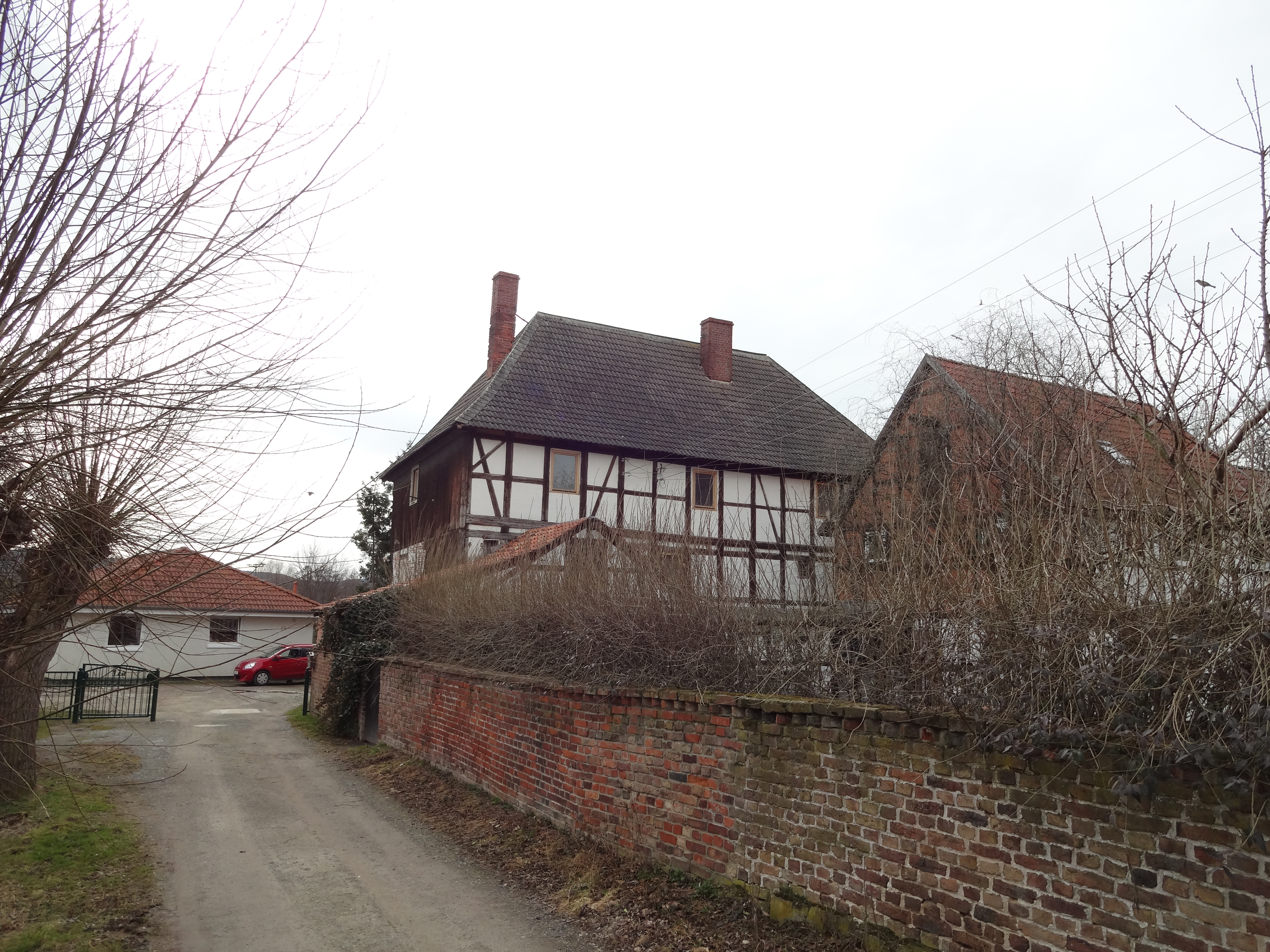 denkmalgeschütztes Bauernhaus in der Straße Am Wasser 17 in Minsleben, Ortsteil von Wernigerode